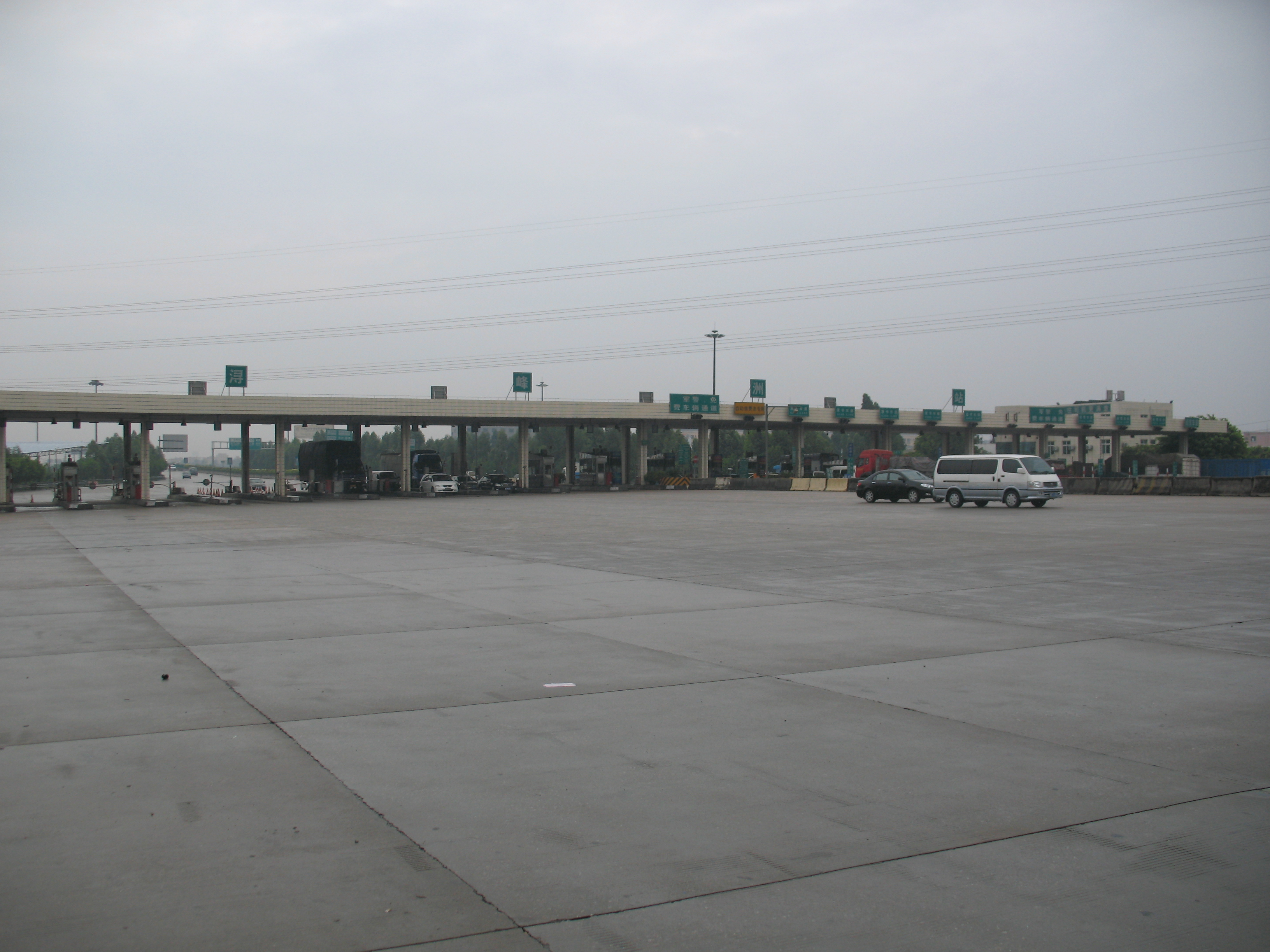 广州环城高速浔峰洲收费站